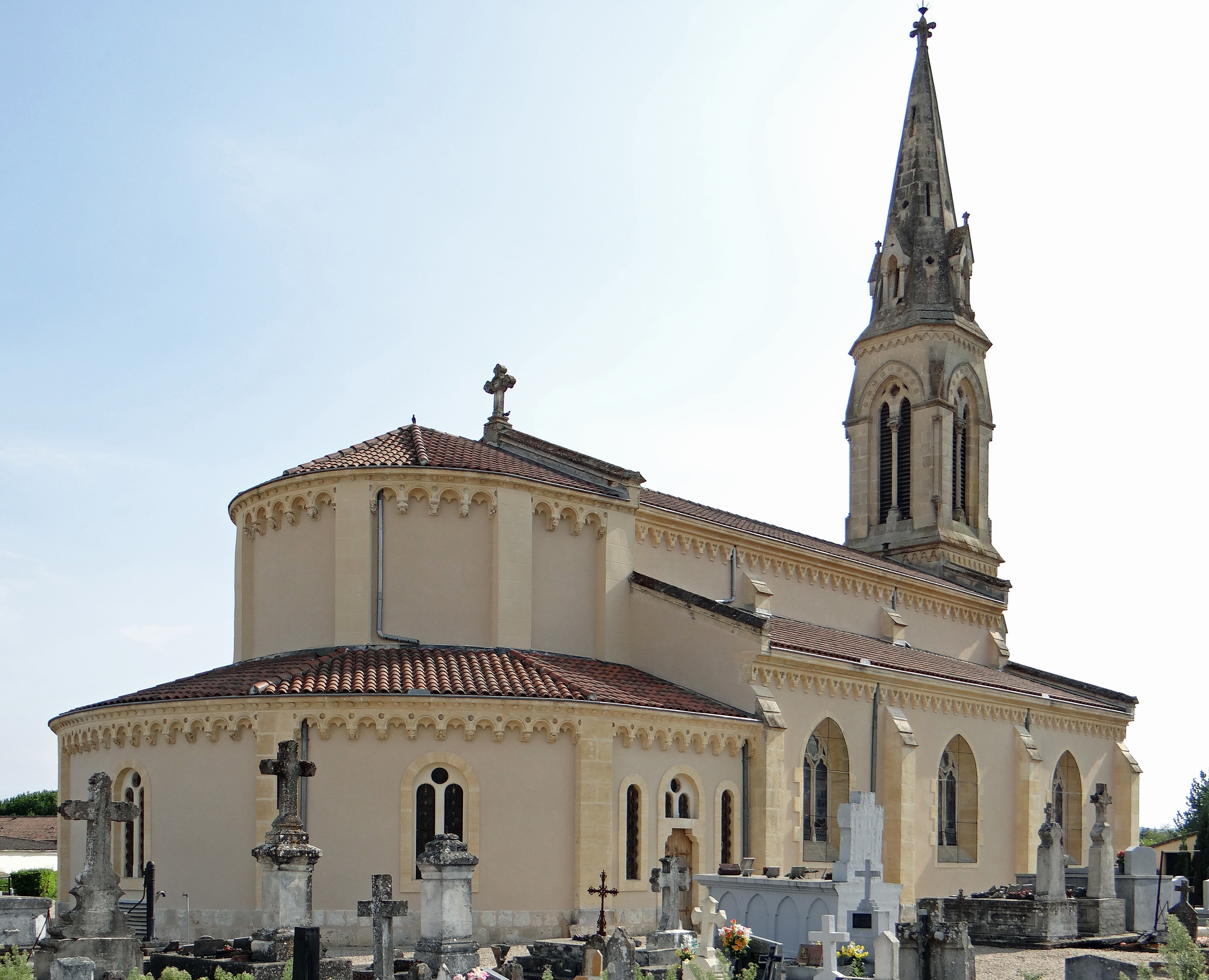 Bias (Lot-et-Garonne) - Église Notre-Dame - Ensemble vu du chevet